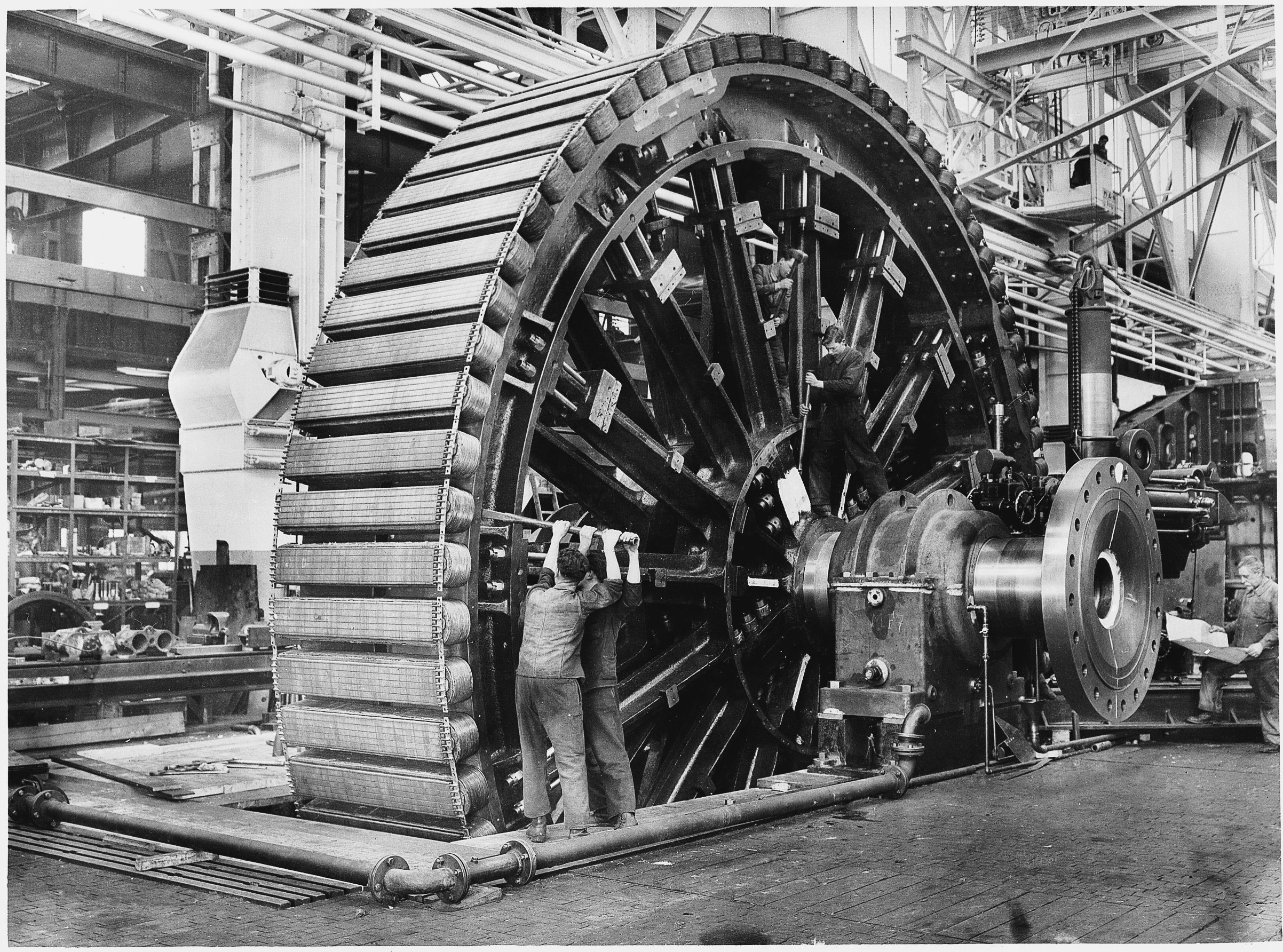 Polrad zu einem Generator des Kraftwerks Ryburg-Schwörstadt. Mit einer Leistung von rund 30 Megawatt gehörten die vier Generatoren des Kraftwerks lange zu den leistungsfähigsten Europas.